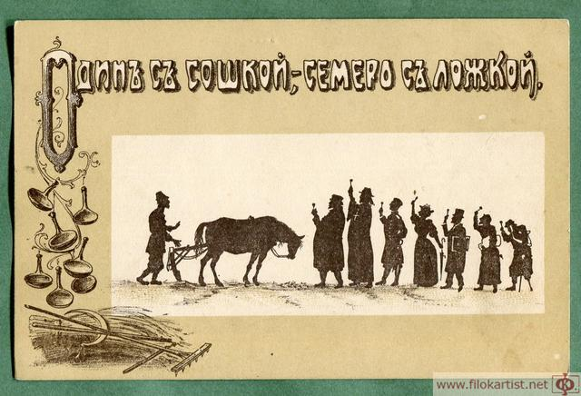 Открытка "Один с сошкой, семеро с ложкой" Ширина: 140мм Высота: 90мм